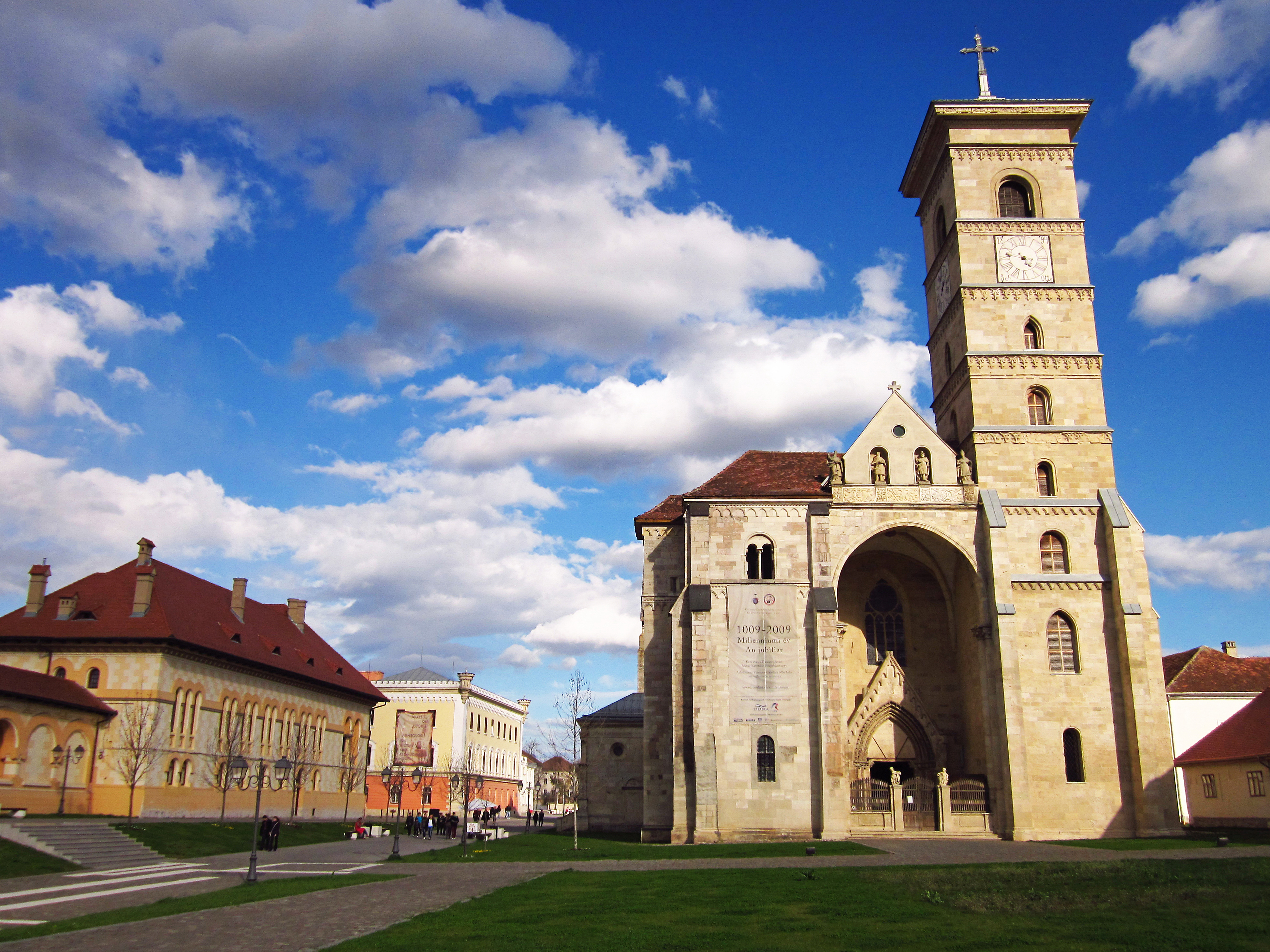 ROMANIA - Alba Iulia - St.Michael Cathedral